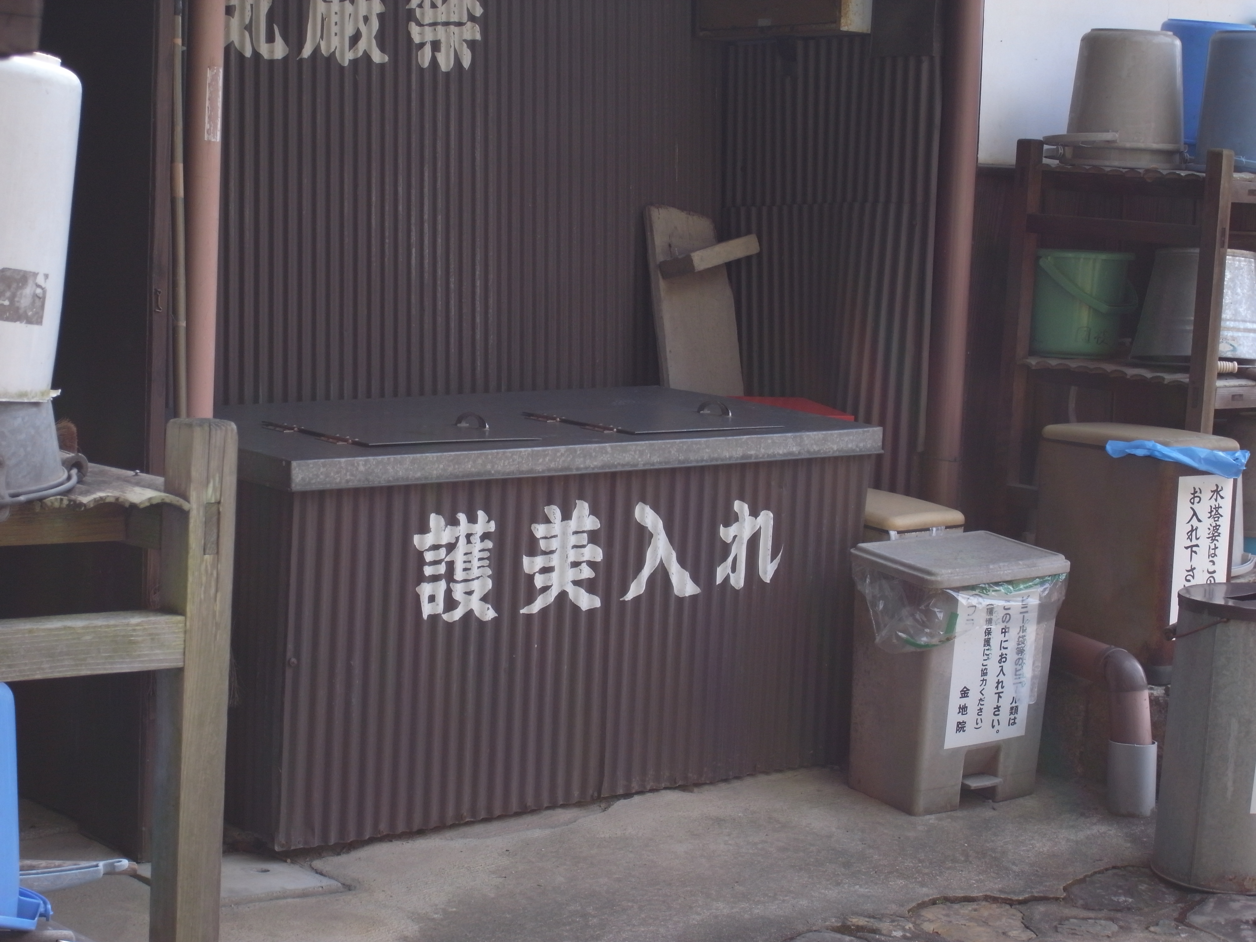 Exif_JPEG_PICTURE go-mi-ire 金地院